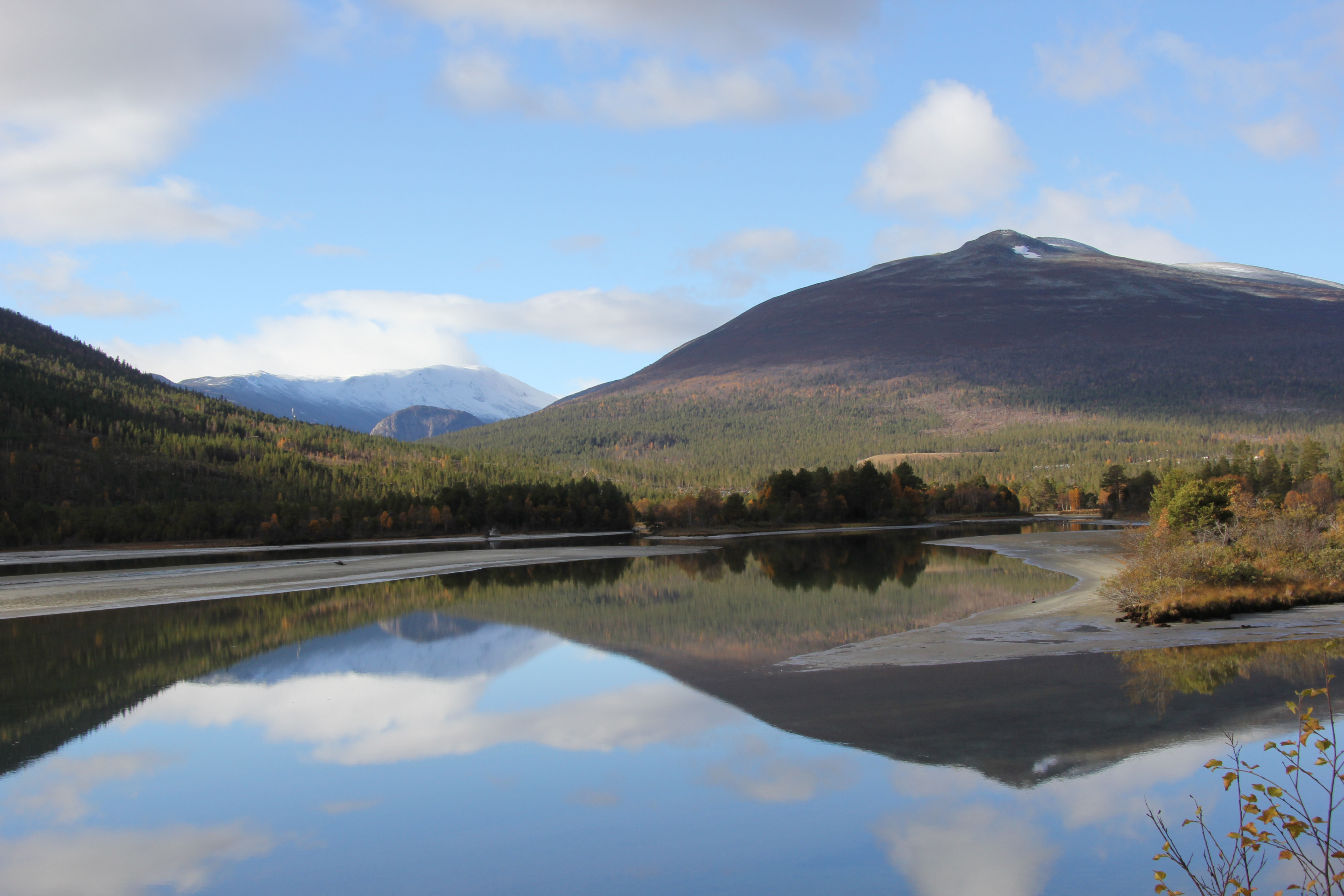 Billingsdalen, Pollvatnet